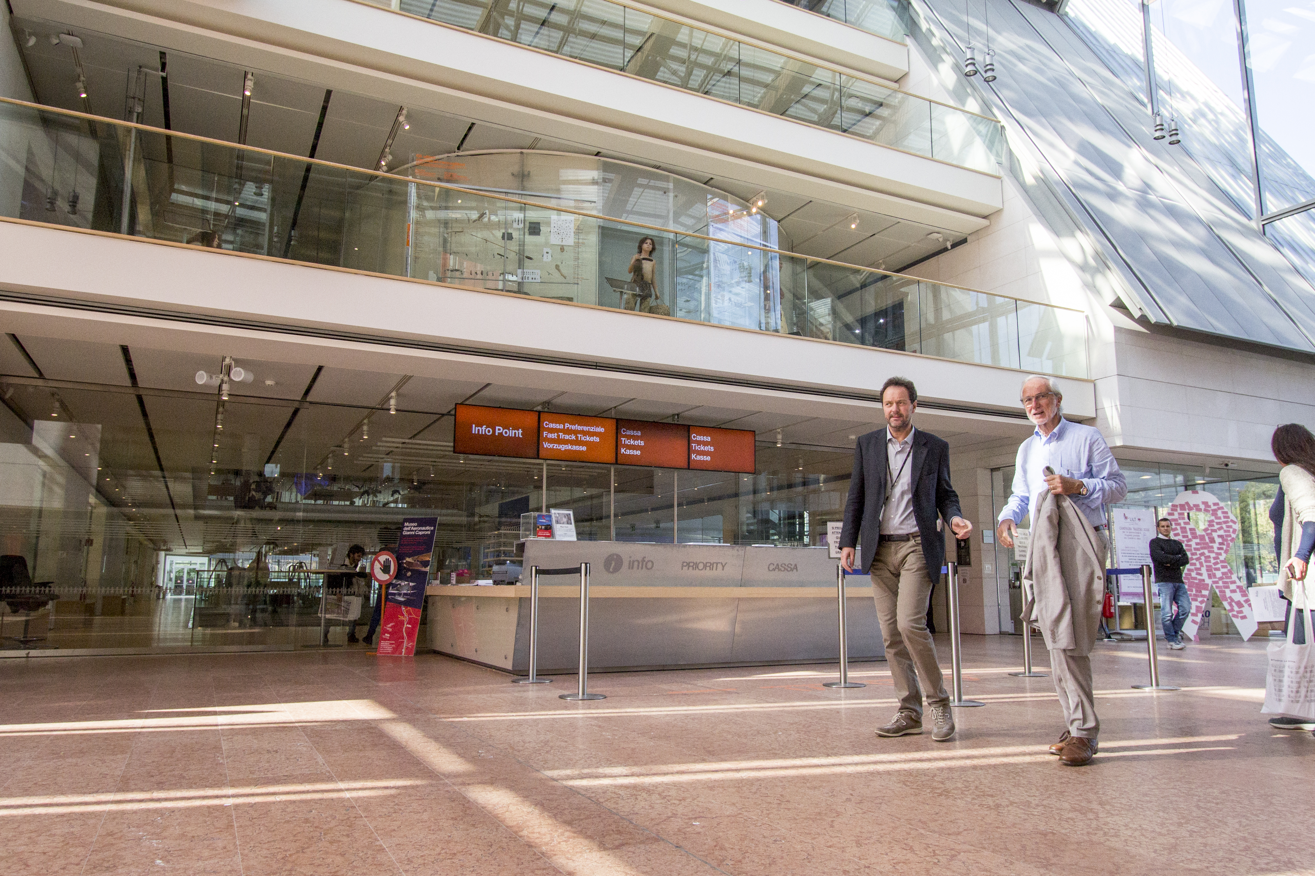 Michele Lanzinger e Renzo Piano nella lobby del MUSE - Museo delle Scienze.